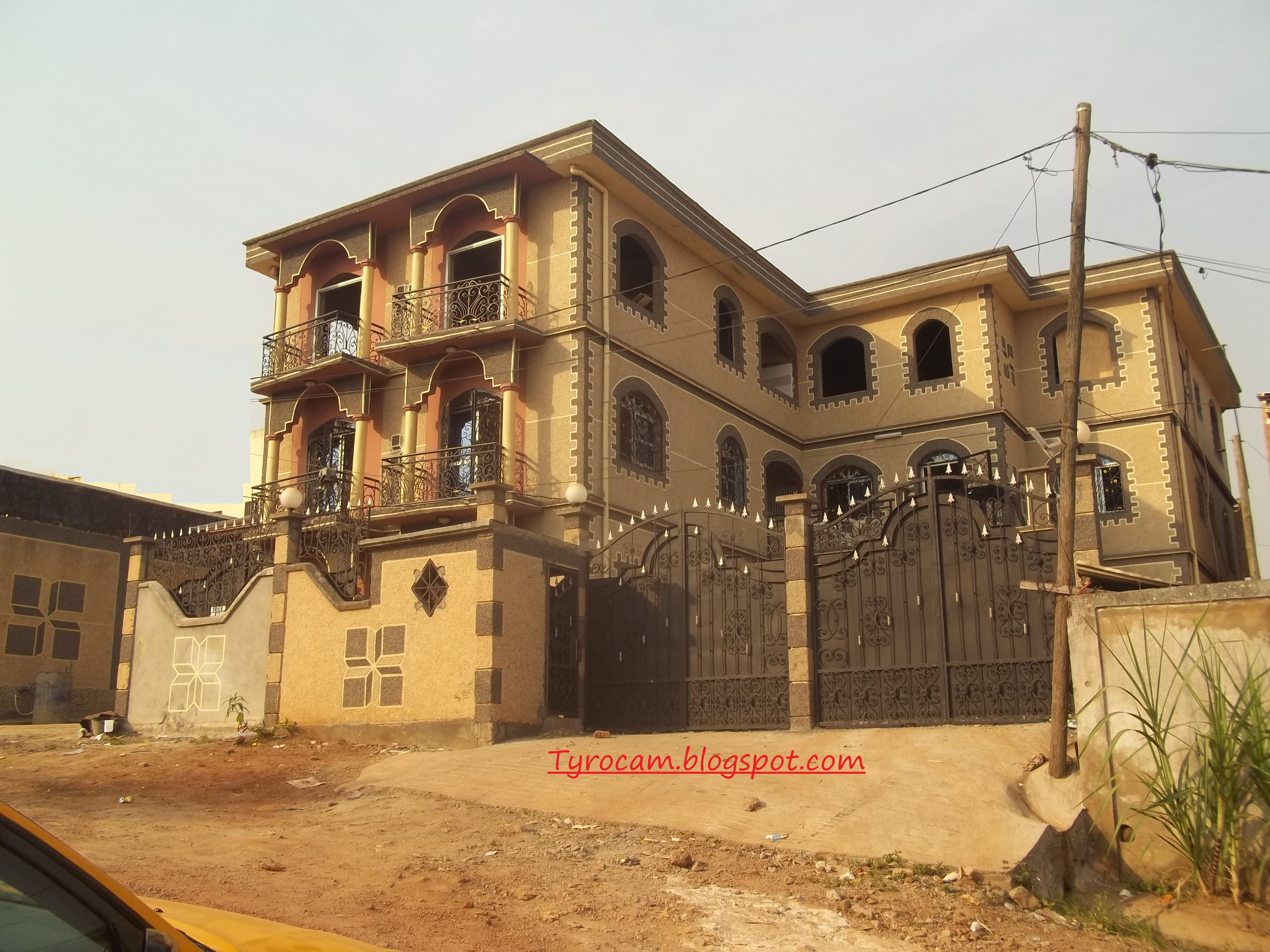 Mosaïque de grains tyrocam